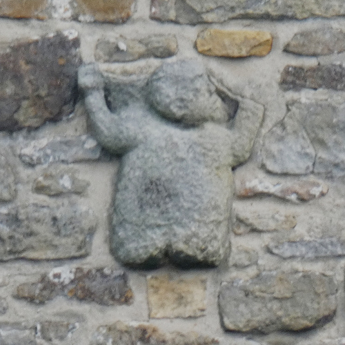 Der Leck-meck am Turm der Heilig-Kreuz-Kirche in Kirchdorf, Stadt Barsinghausen,Region Hannover, Niedersachsen